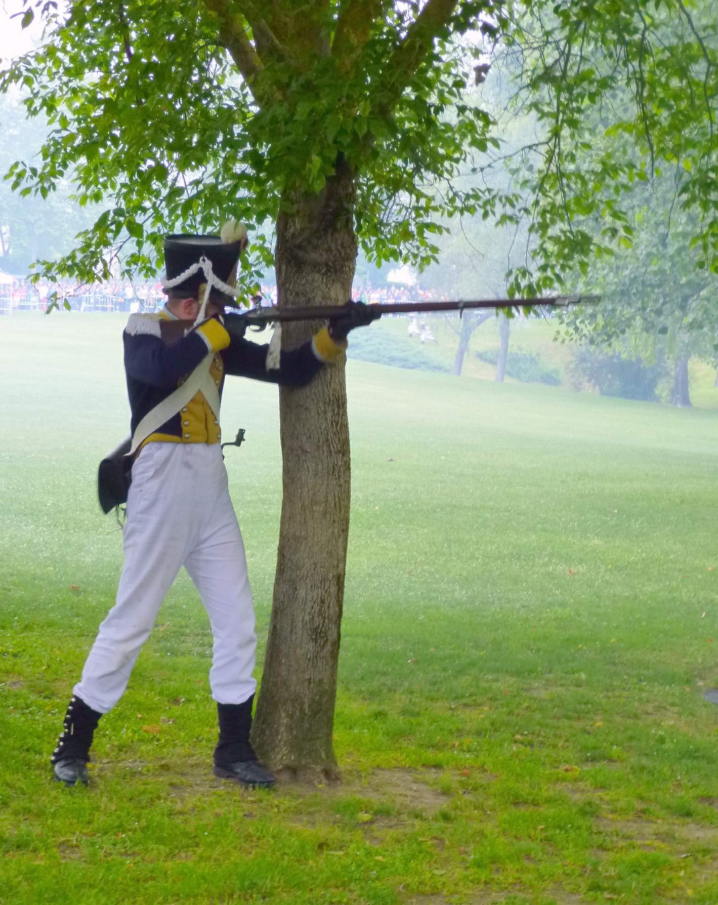 II Recreación histórica de la Batalla de Vitoria (1813), campa de Armentia, Vitoria-Gasteiz, 28-06-2014